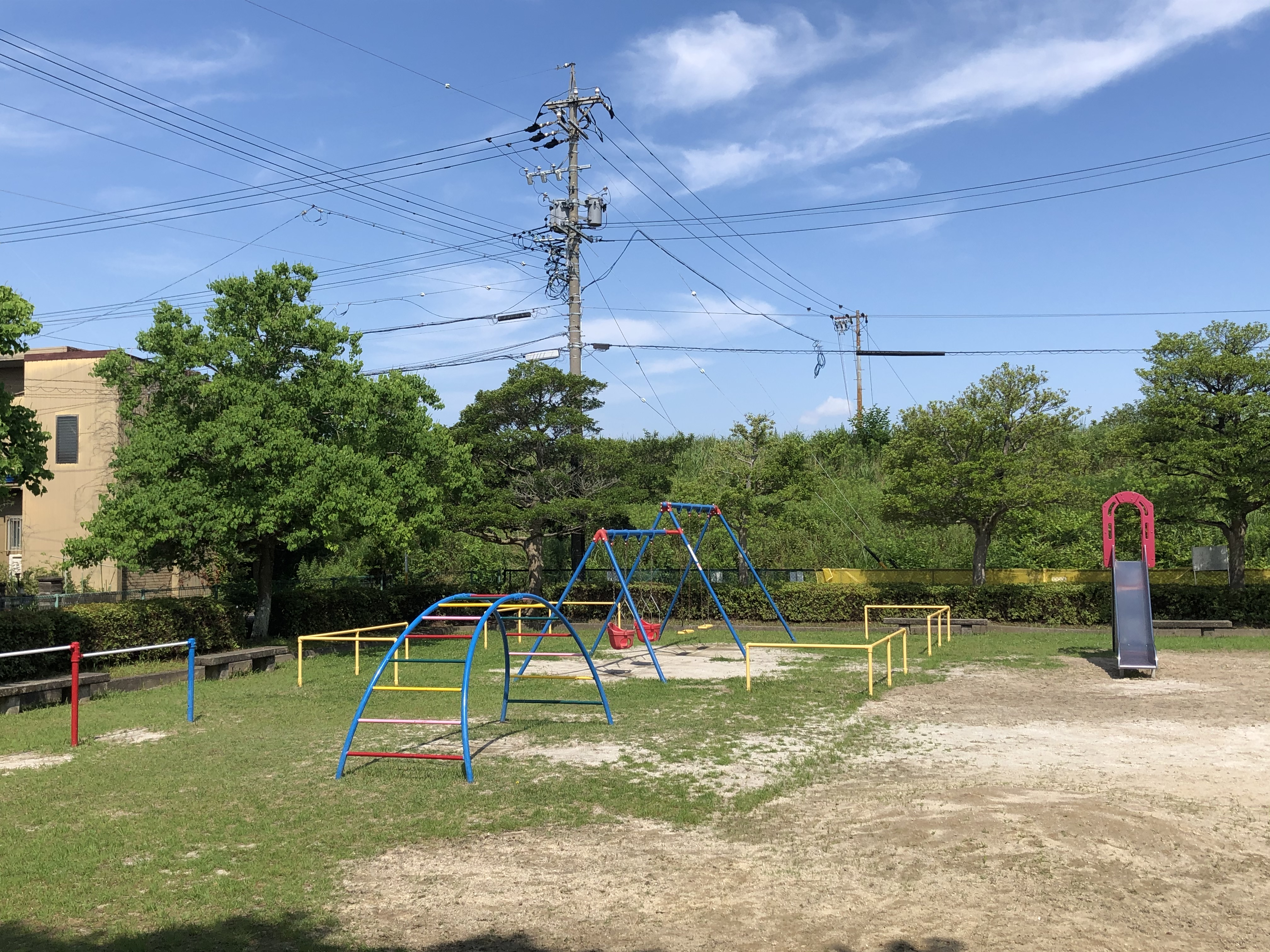 宮前公園（岡崎市六名南）